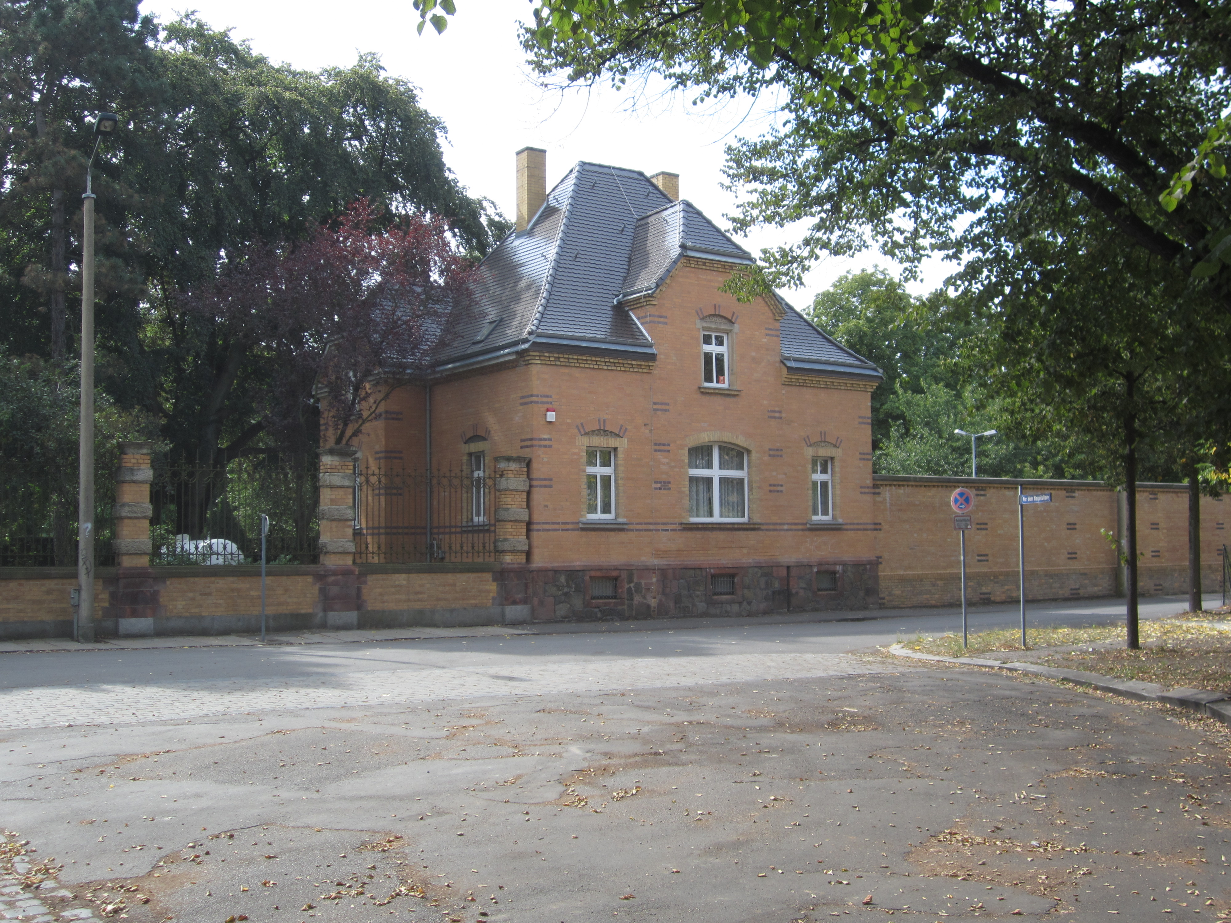 Verwaltungsgebäude am Friedenspark (ehem. Neuer Johannisfriedhof), An dem Hospitaltore